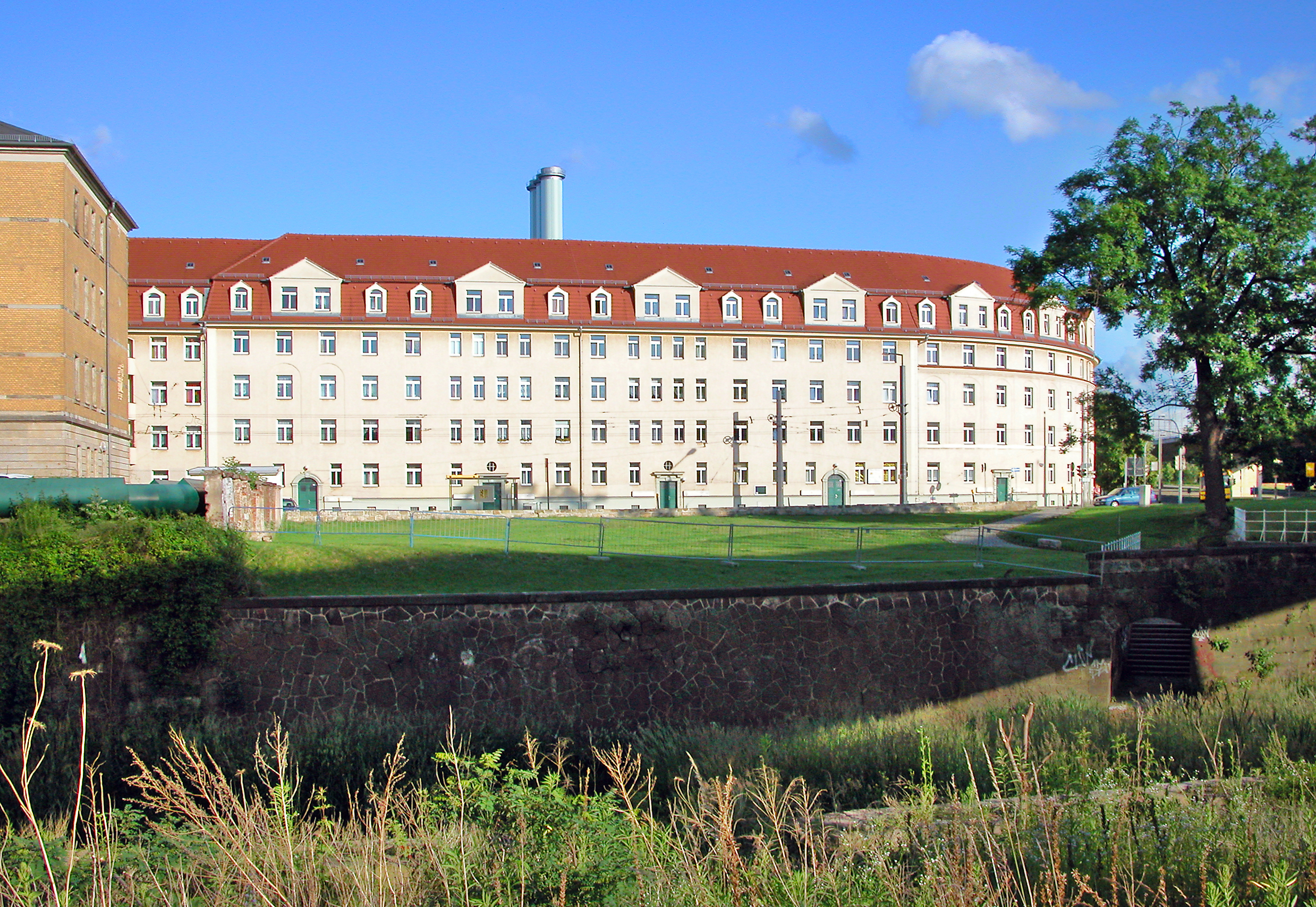 09.06.2009 01159 Dresden-Löbtau: Blick von Westen über die Weißeritz in Richtung Ebertplatz. Die Dr.-Höhne Häuser Freiberger Straße 119, 121 / Ebertplatz 1... (GMP: 51.043307,13.705899). Die Wohnbauten entstanden 1920-1921 im Auftrag des Dresdner Spar- und Bauvereins nach Plänen von Paul Beck. [DSCN37865.TIF]20090609035DR.JPG(c)Blobelt